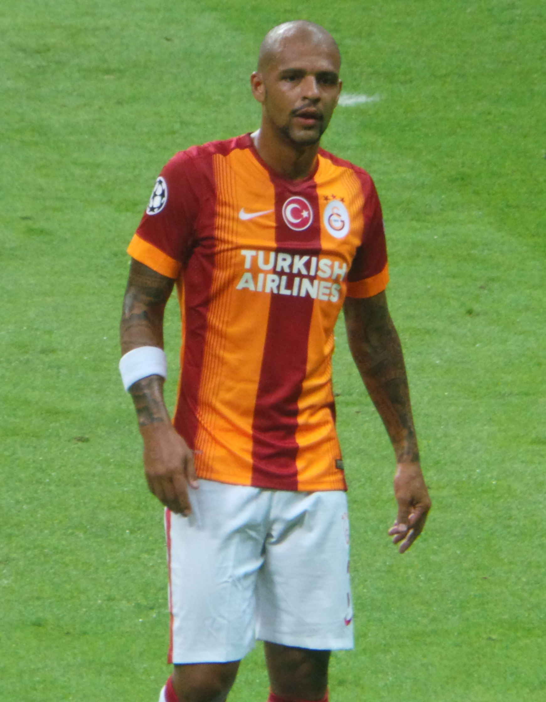 Felipe Melo 2014-15